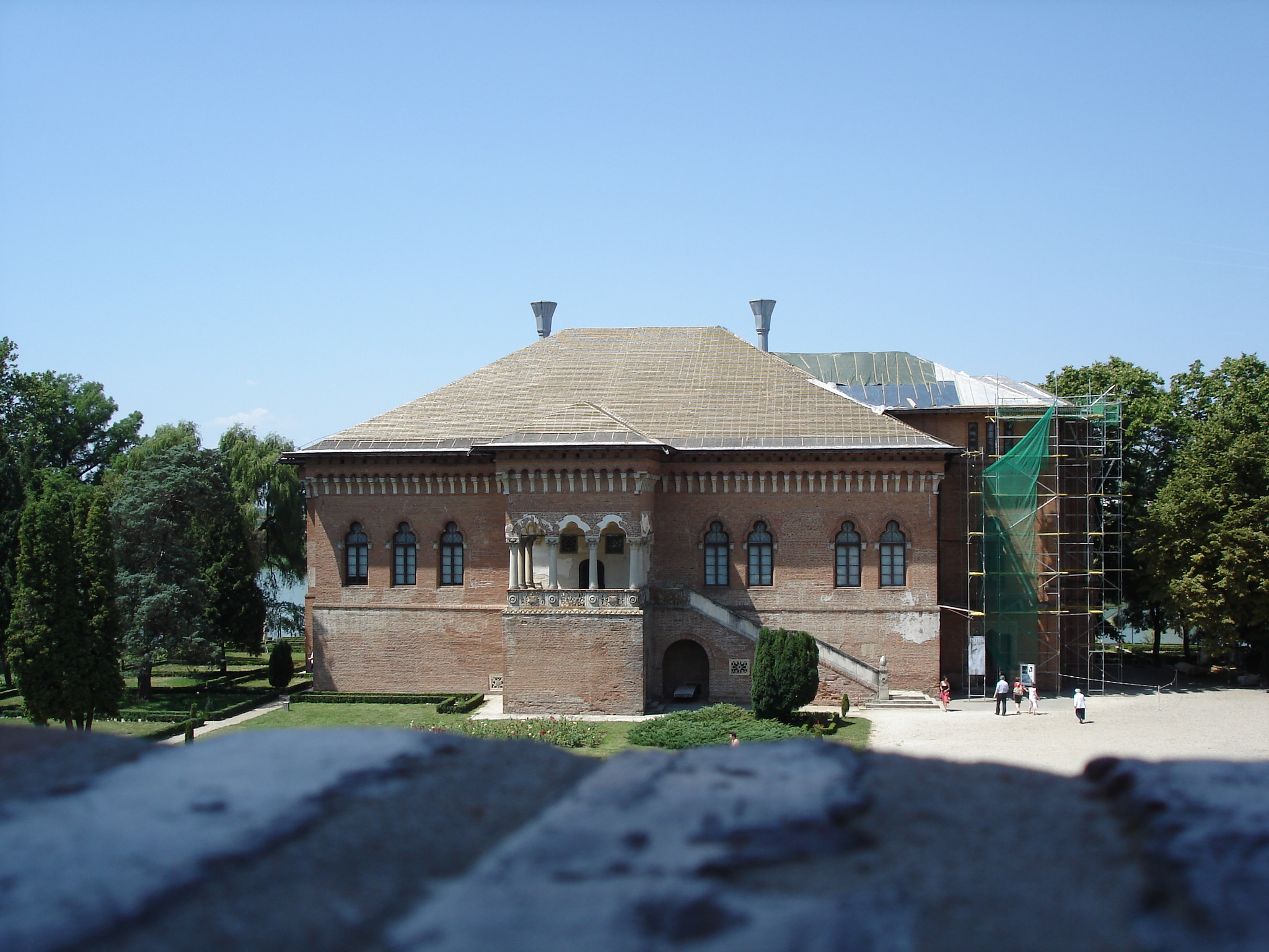 Palatul Mogoşoaia văzut de pe turnul de la intrarea în curte. 01